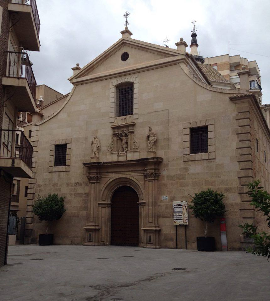 Fachada de la Iglesia de San Miguel de Murcia (España). Finales del siglo XVII, comienzos del XVIII.